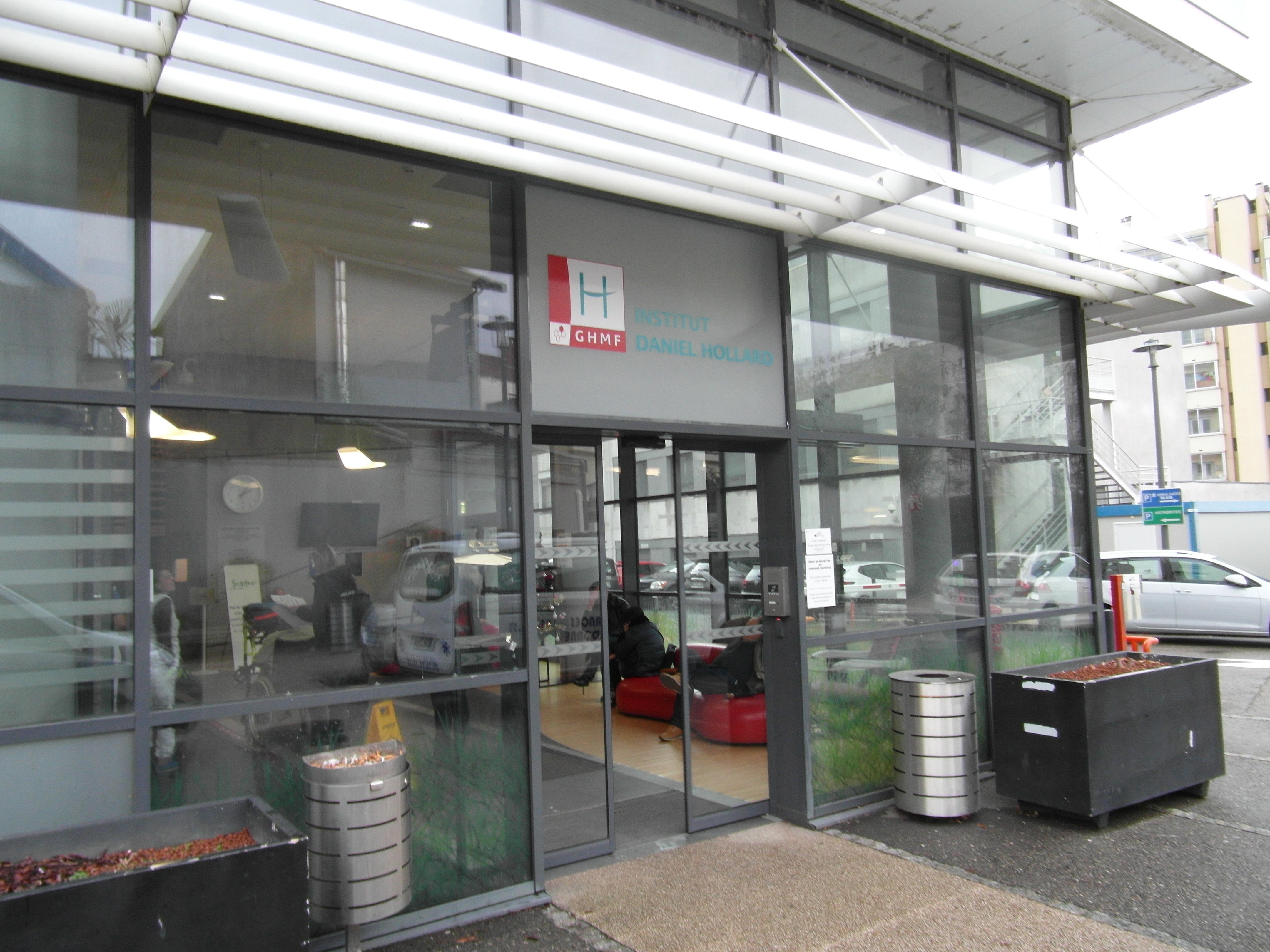 Entrée de l'institut Daniel Hollard du groupe hospitalier mutualiste de Grenoble (extérieur)